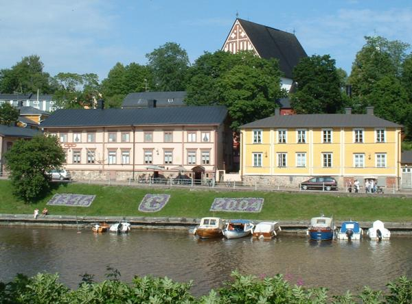 Porvoon tuomiokirkko kuvattuna Porvoonjoen takaa suunnasta, josta päädyn tunnusomainen kuviointi näkyy. Joenrannan kukkaistutuksista keskimmäinen kuvaa Porvoon vaakunaa.